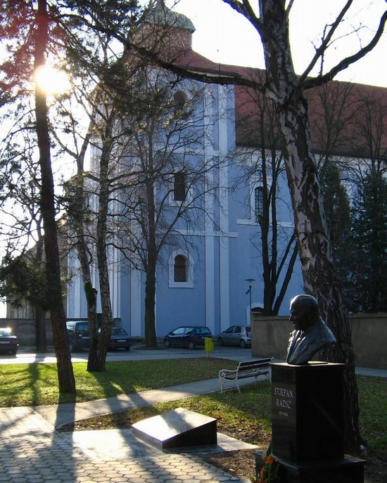 Franjevački samostan u Slavonskom Brodu i spomenik Stjepanu Radiću